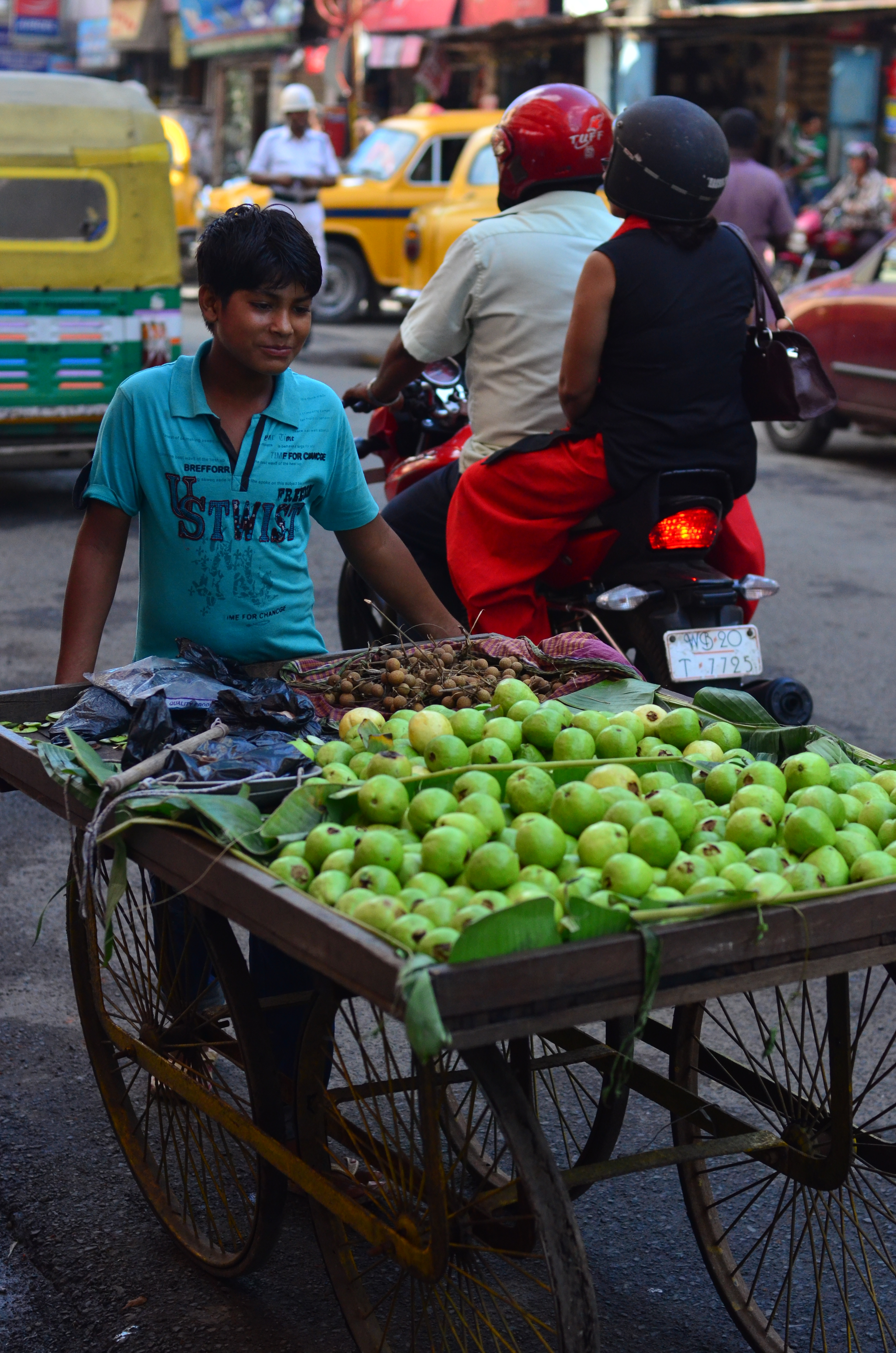 Fruit seller on Free School St, Kolkata